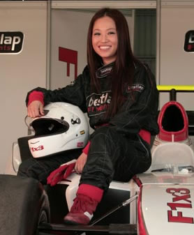 La actriz coreana Usun Yoon en un monoplaza de Fórmula 1.